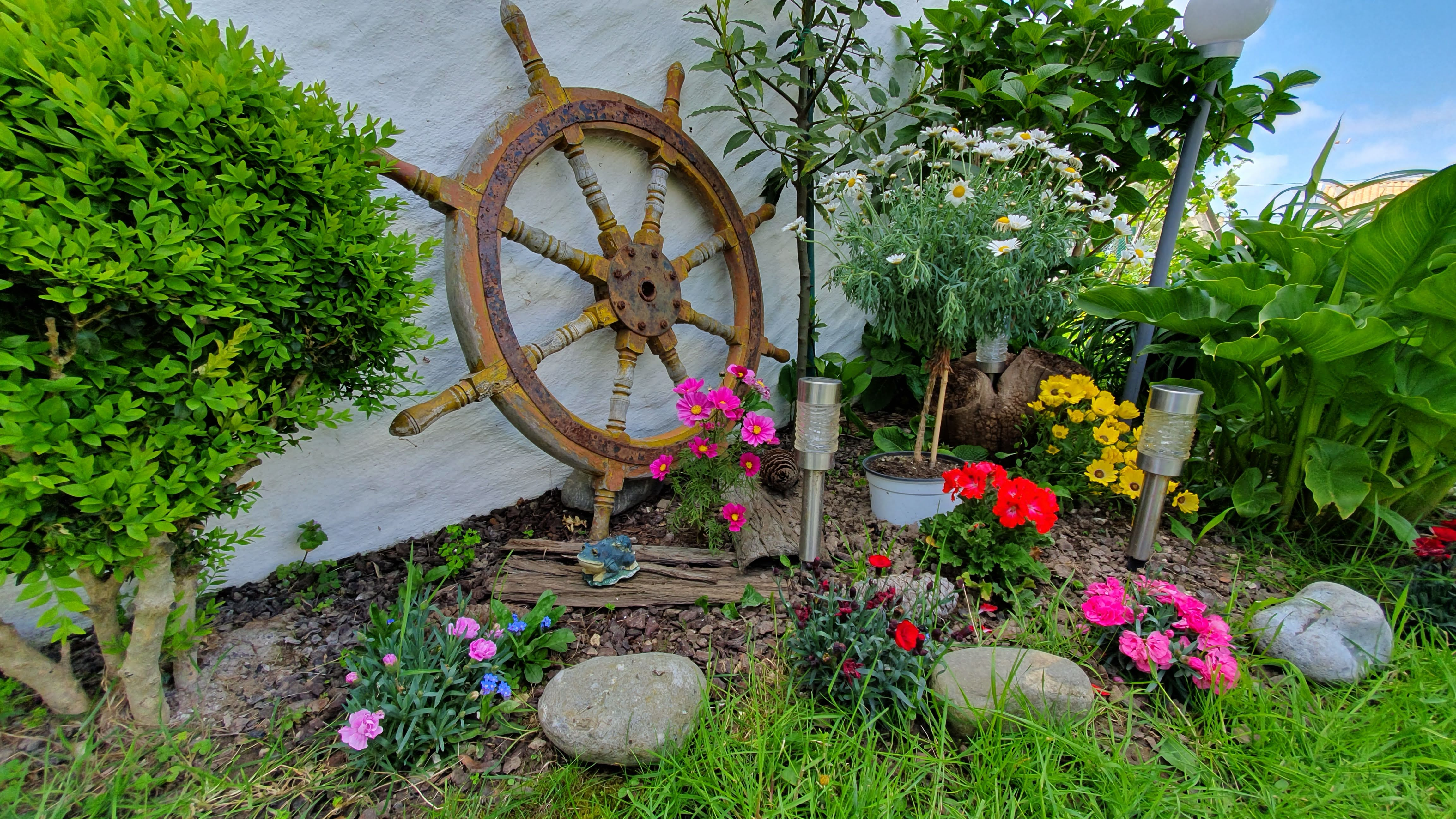 Jardin vendéen